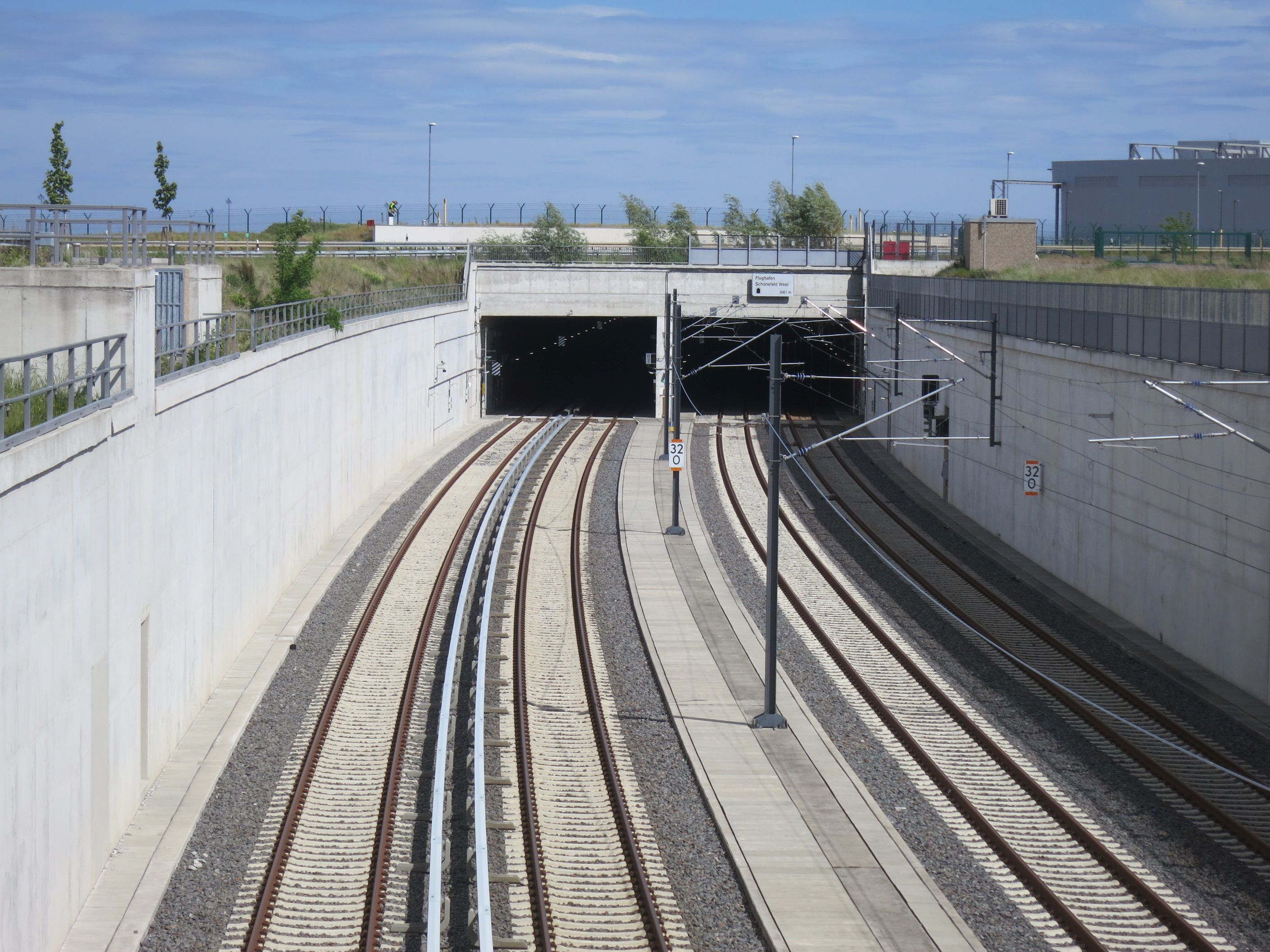 Selchow, Bahnstrecken zum BER, Trog, Einfahrt in den Tunnel, links die S-Bahn, rechts die Fernbahnstrecke